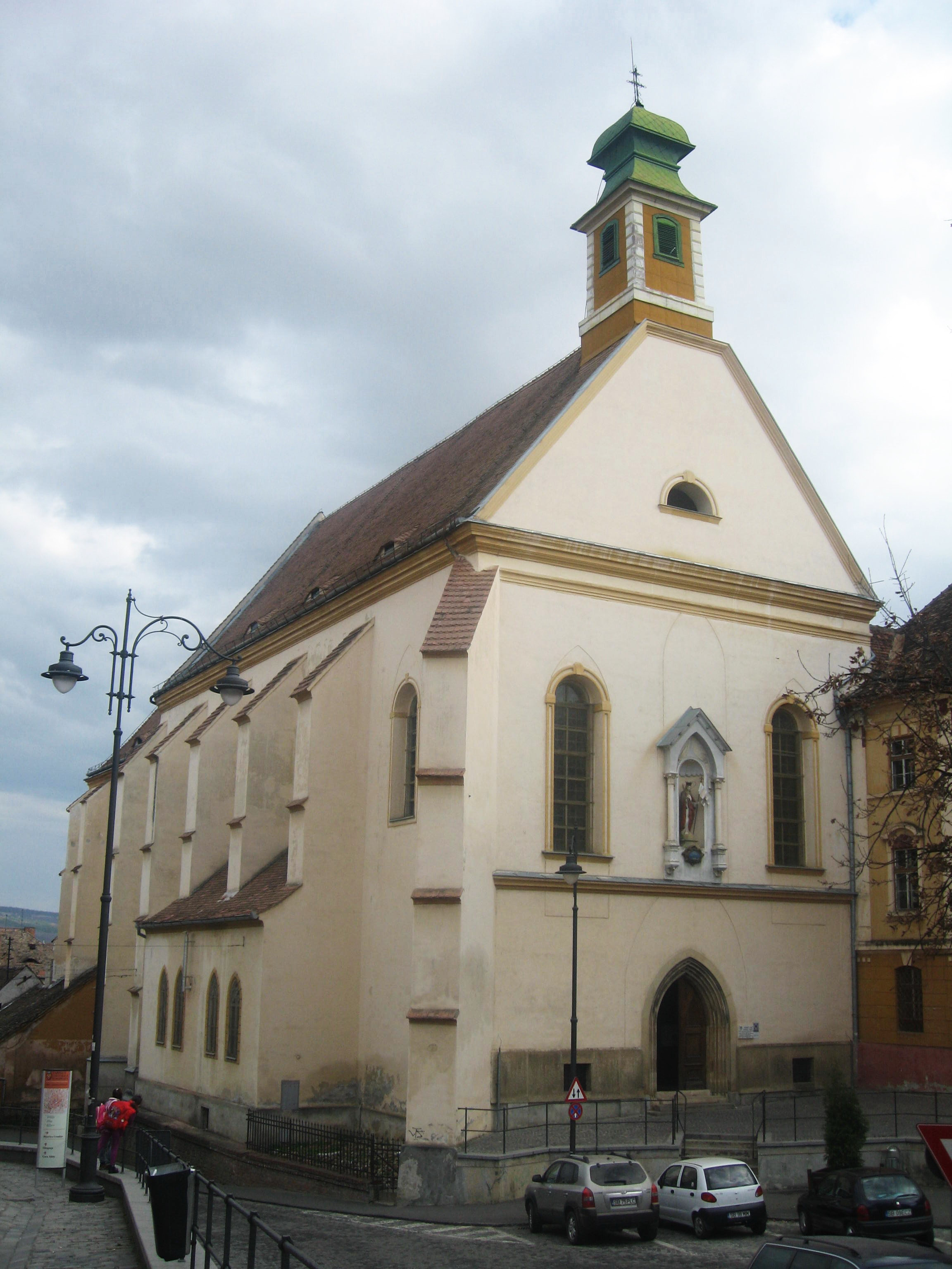 Biserica ursulinelor din Sibiu 01